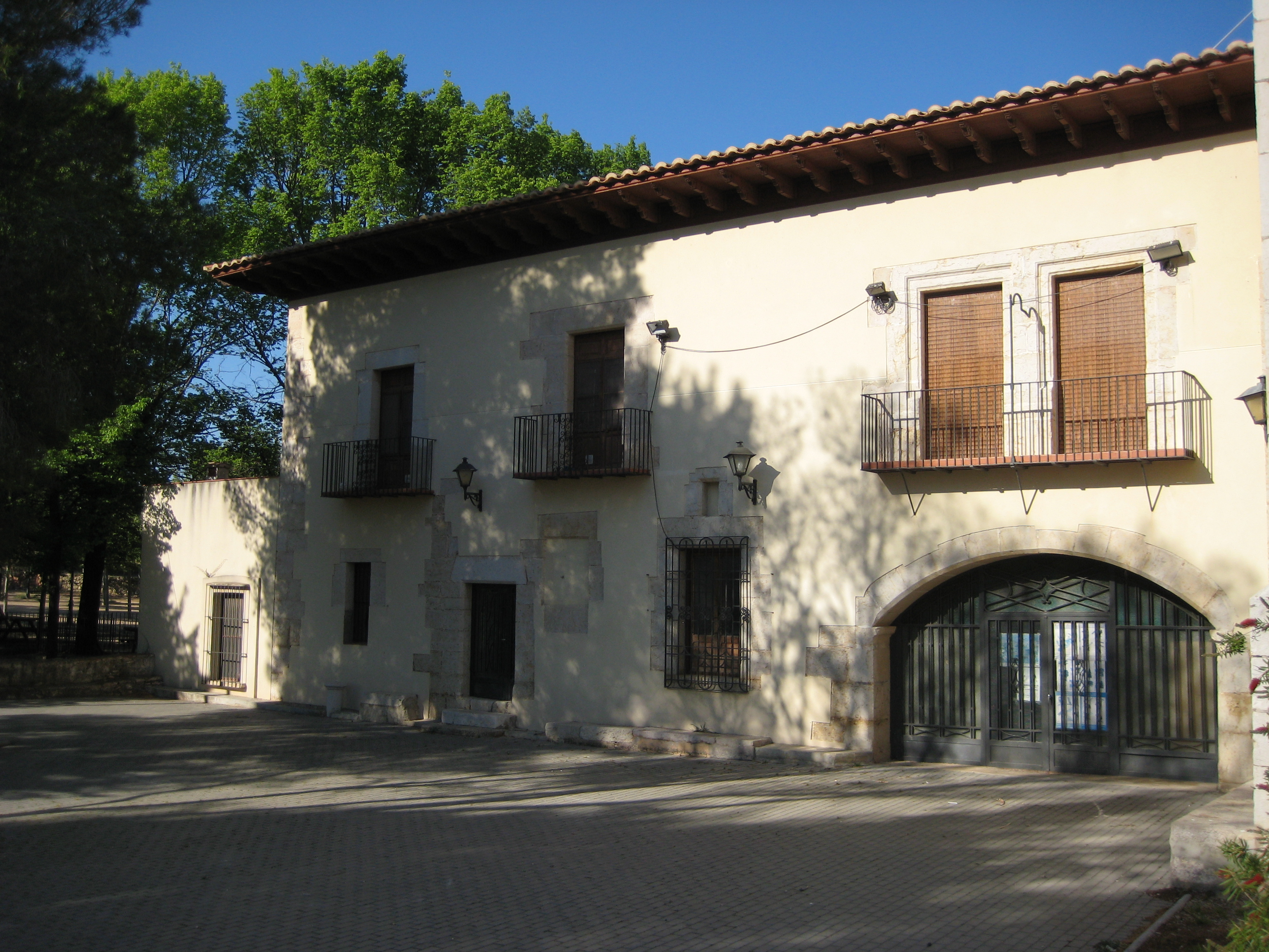 Hostatgeria de l'ermita de la Mare de Déu del Socós de Càlig (Baix Maesrat)